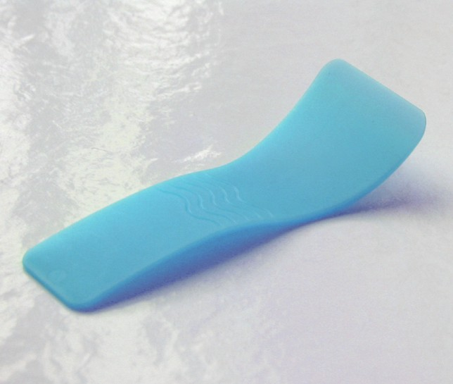 Ein Spatel, wie er typischerweise in Verbindung mit Enthaarungscreme verwendet wird